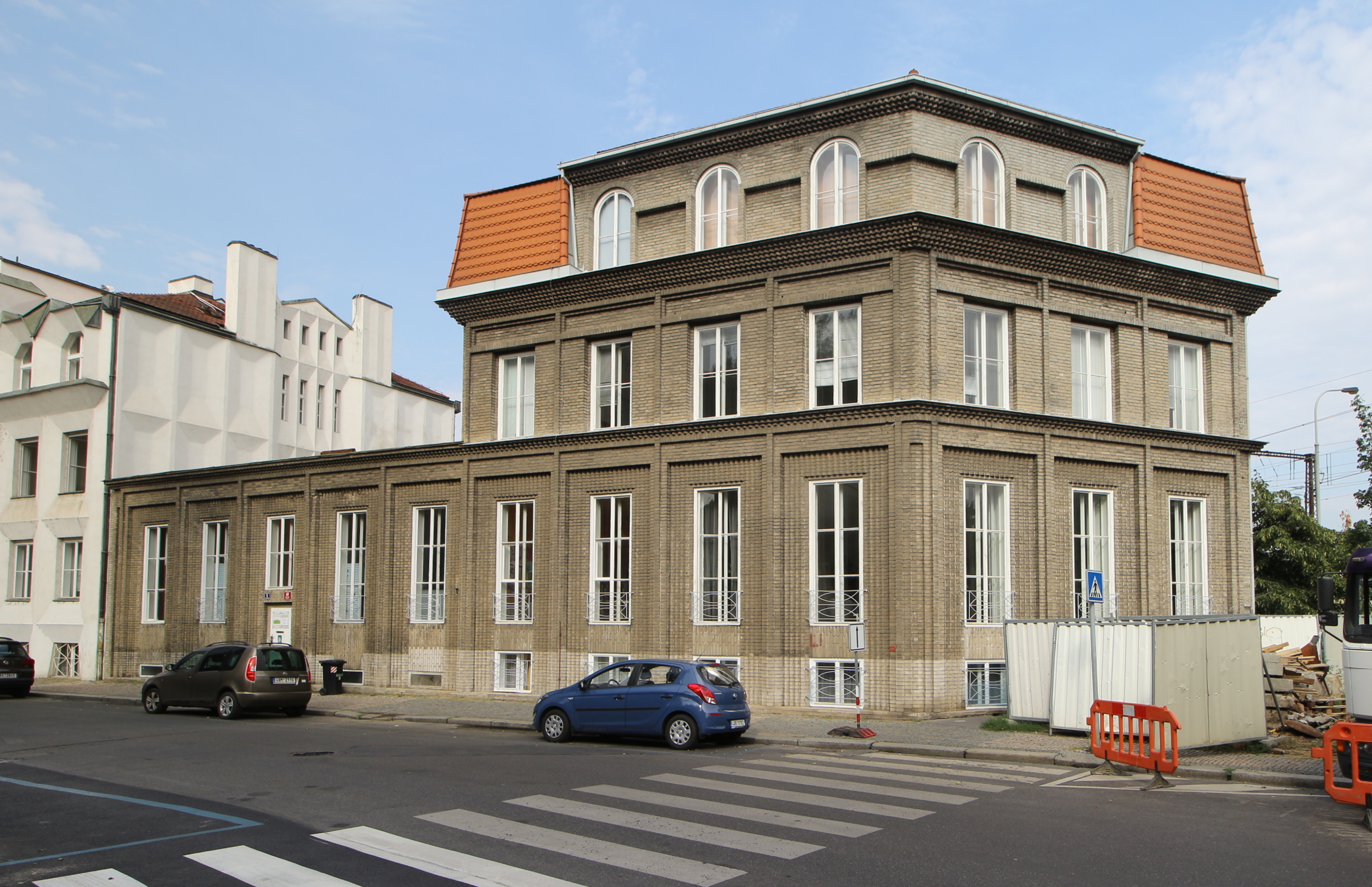 Vyšehradské vily Kovařovicova a Sequensova